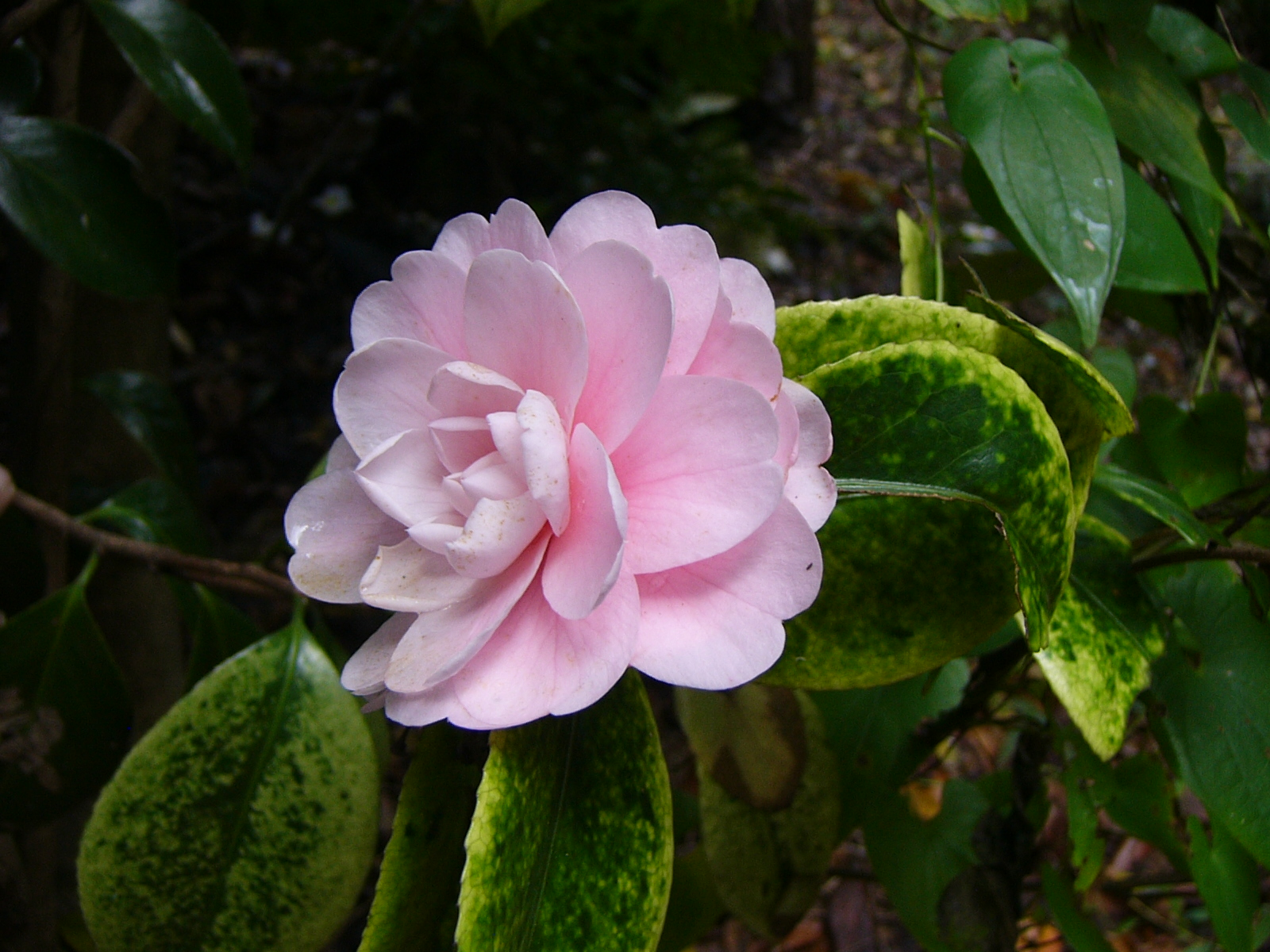 11月20日 周辺の木の紅葉が始まる頃に撮影。斑入りの葉が特徴的。